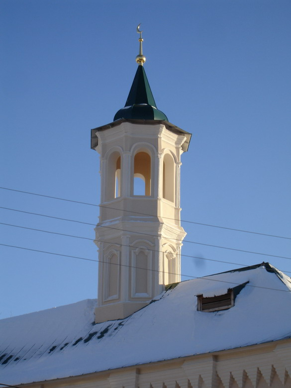 Восстановленный минарет Апанаевской мечети, г. Казань, Татарстан, Россия